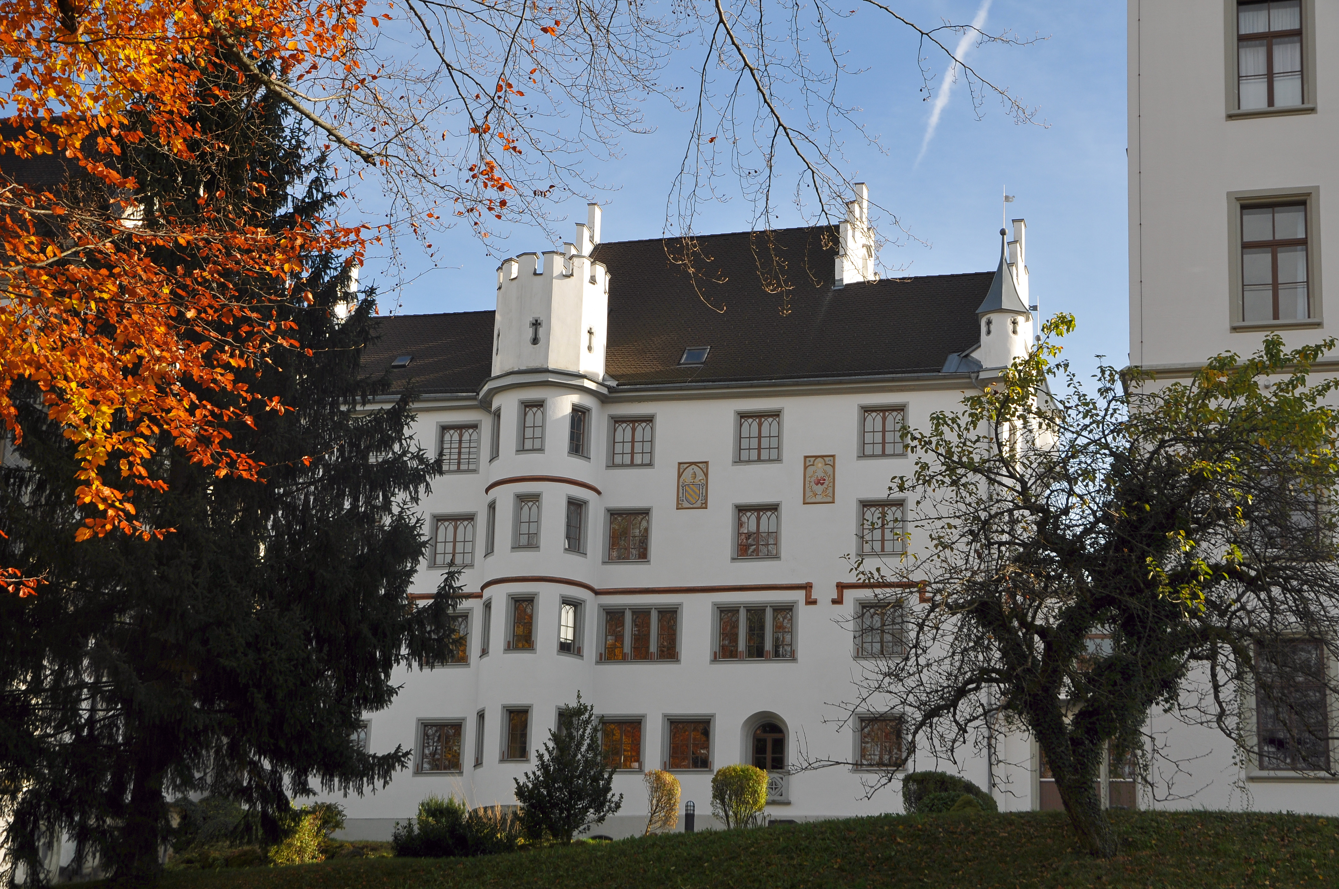 Kloster und Klosterkirche zum Heiligsten Herzen Jesu in Riedenburg mit Sacré Coeur Bregenz Riedenburg Privatgymnasium und Höhere Lehranstalt für wirtschaftliche Berufe. Arlbergstrasse 88-96 in Bregenz, Vorarlberg.